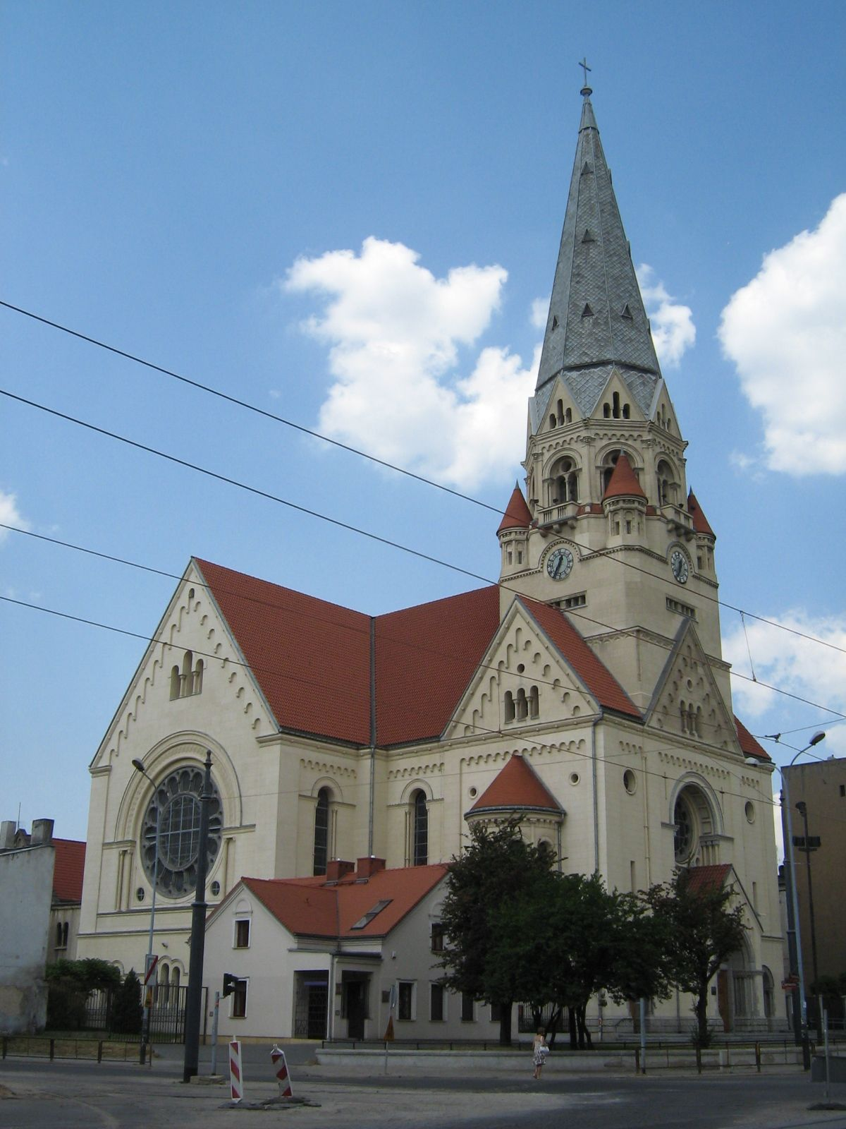 Kościół św. Mateusza w Łodzi